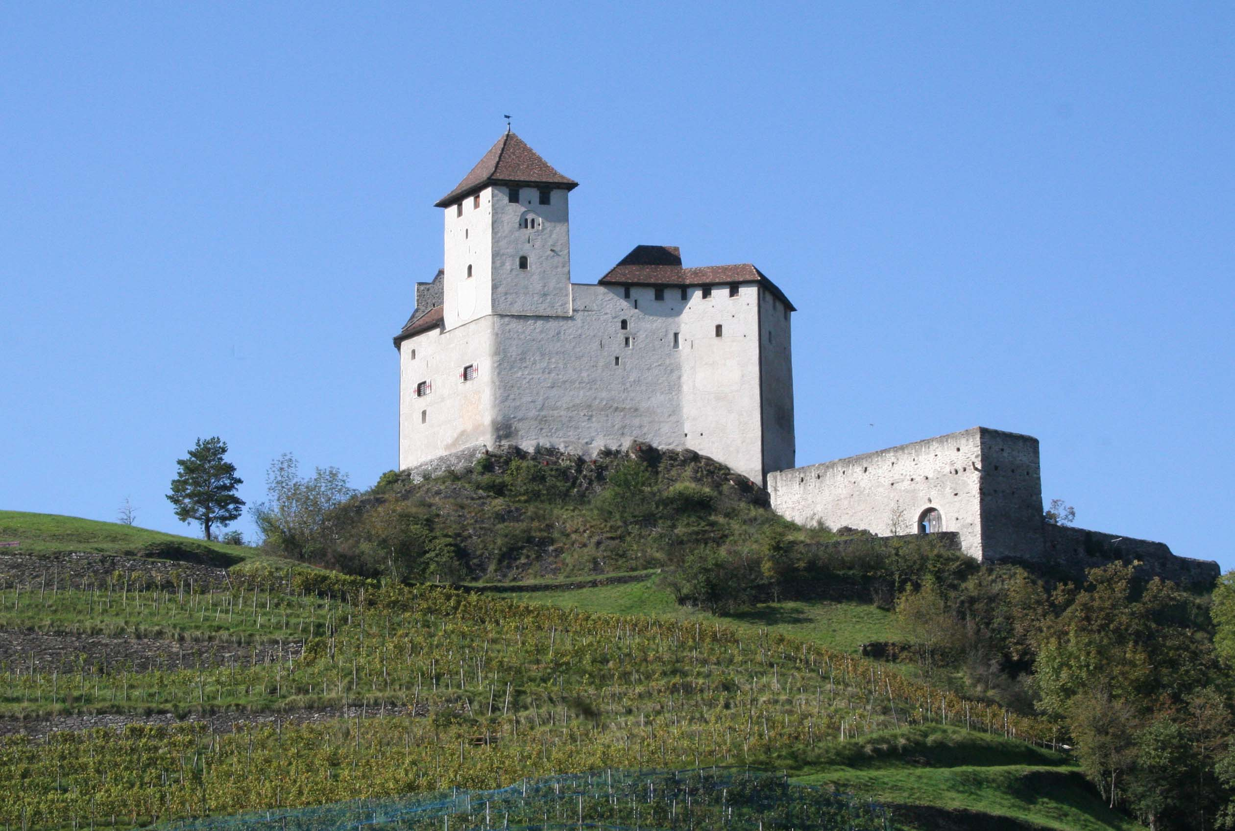 Burg Gutenberg in Balzers, Ansicht von Süden